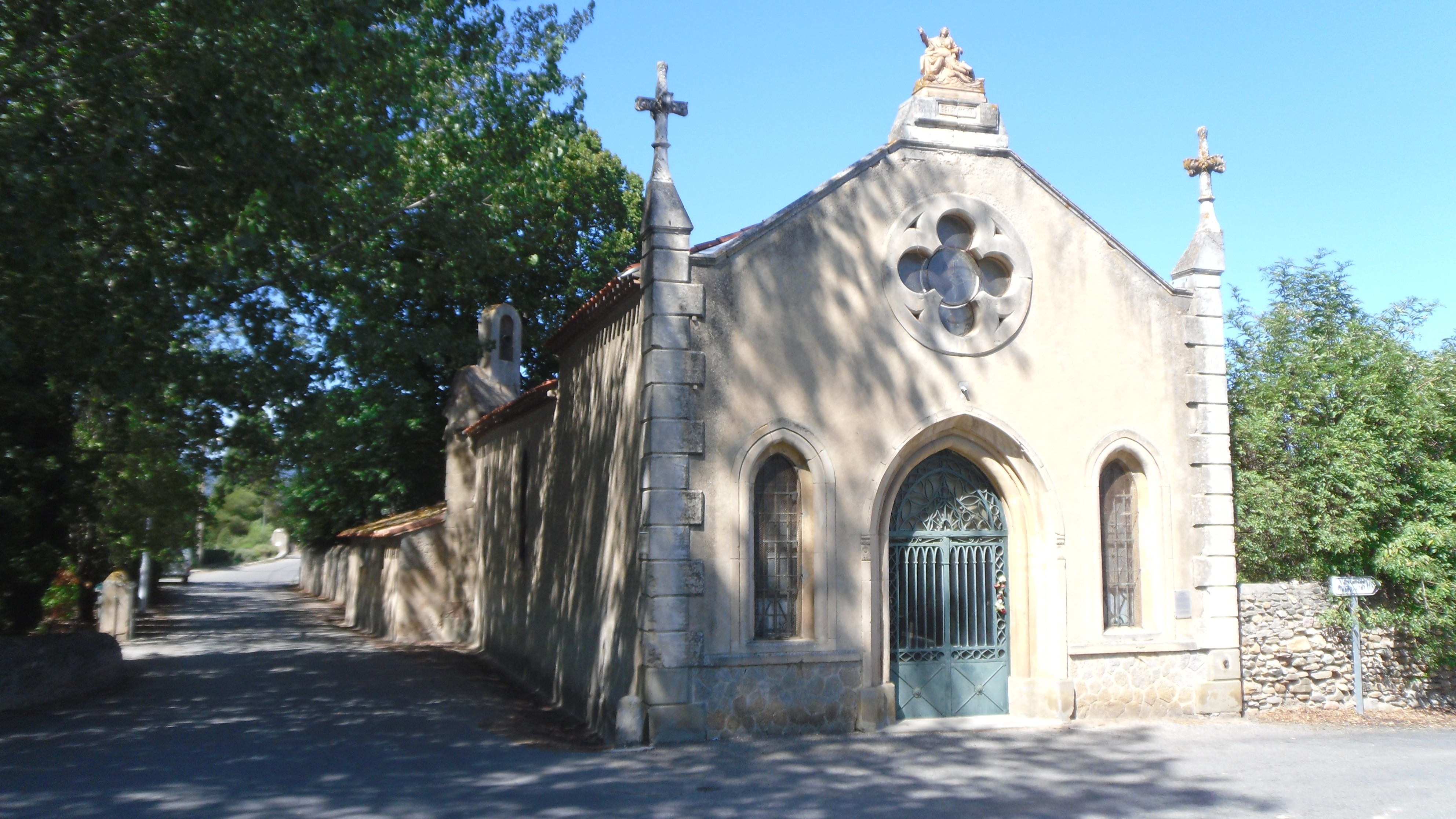 Chapelle Notre-Dame du bout du pont à Rieux-Minervois